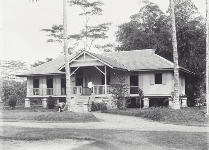 Foto. Clubgebouw, Padang Brahrang